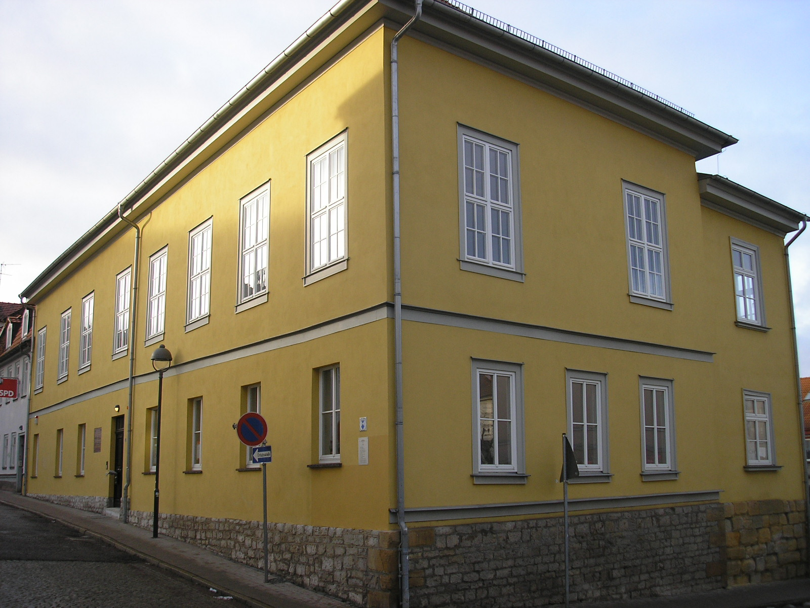 Der Tivoli in Gotha (Thüringen), Gründungsort der SPD 1875.